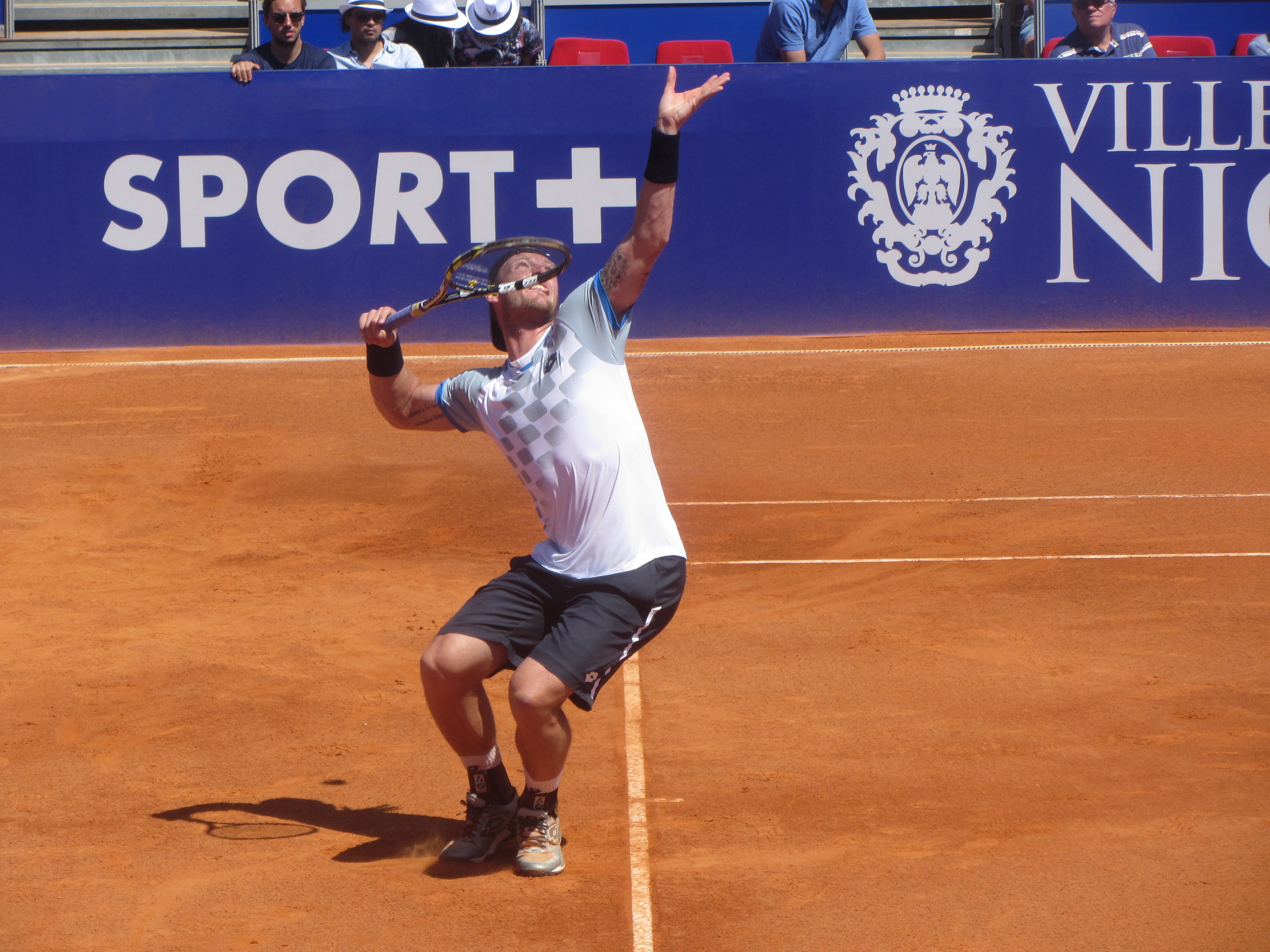 Sam Groth à Nice en 2015